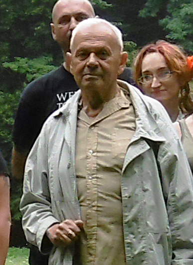 Stanisław Potrzebowski, V Ogólnopolski Zjazd Rodzimowierczy (2017)